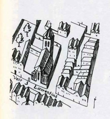 Stadtansicht nach Mercatot 157. Ausschnitt St. Laurenz